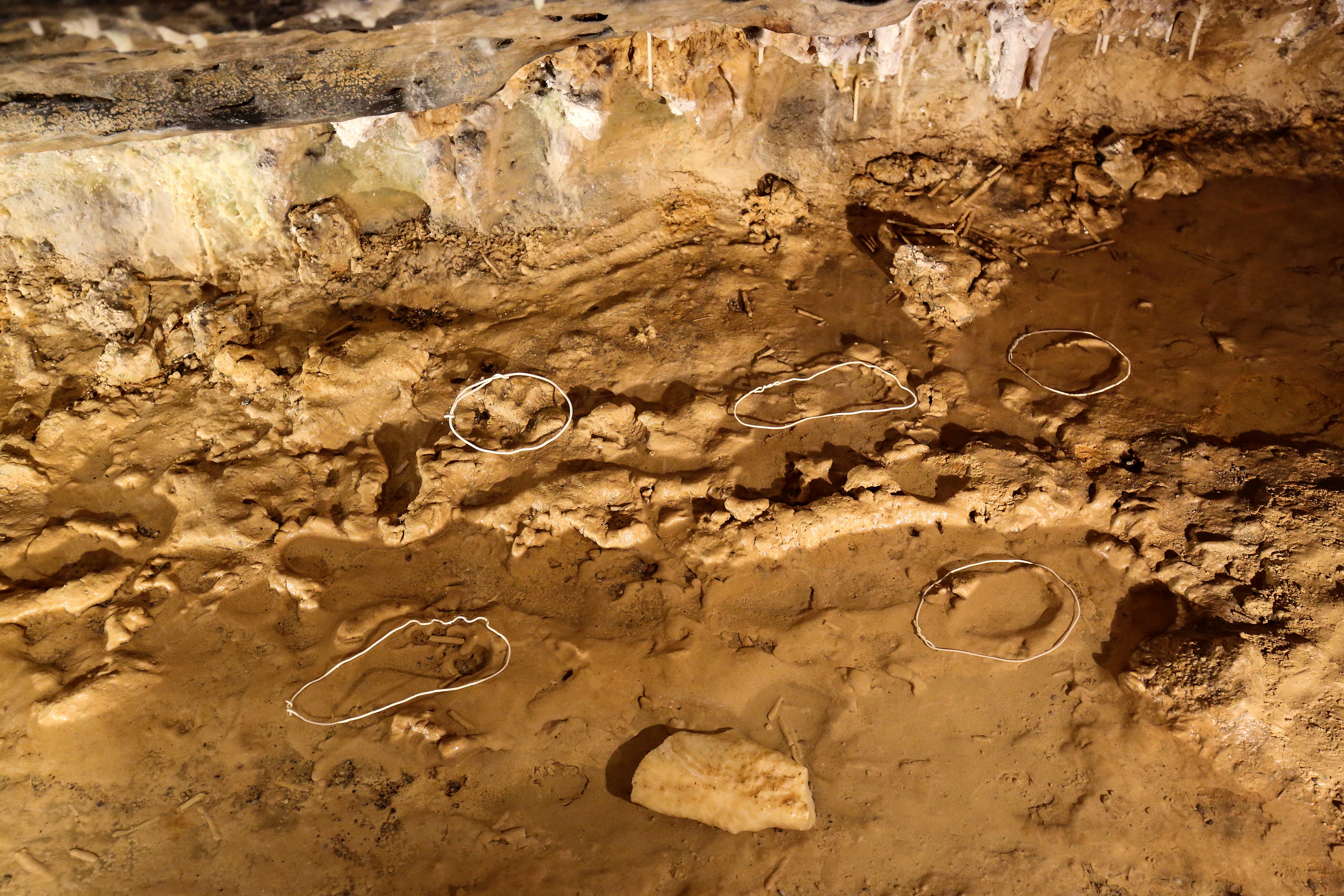 Grotte di Toirano This is a photo of a monument which is part of cultural heritage of Italy.